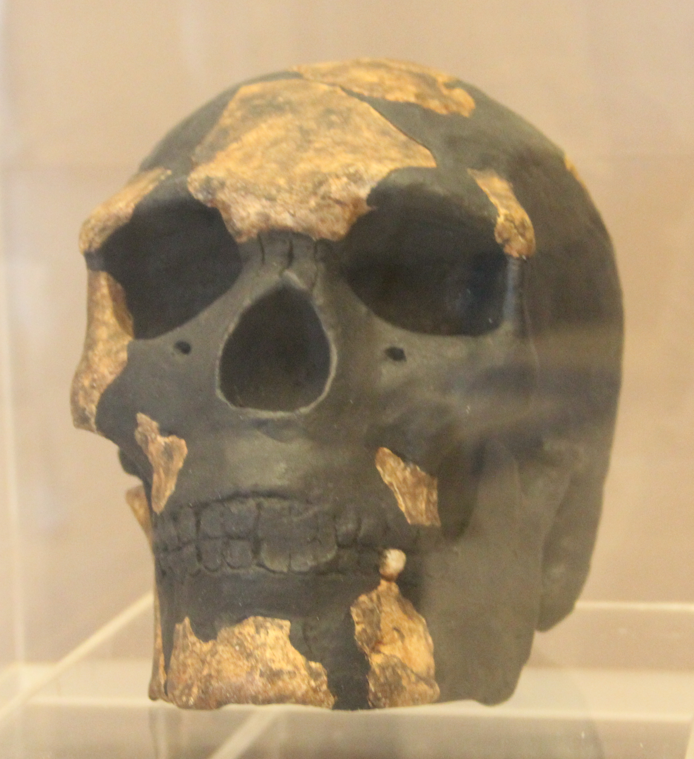 Reproduction du crâne de l'Homme de Kibish. Musée des Civilisations Noires de Dakar (Sénégal).